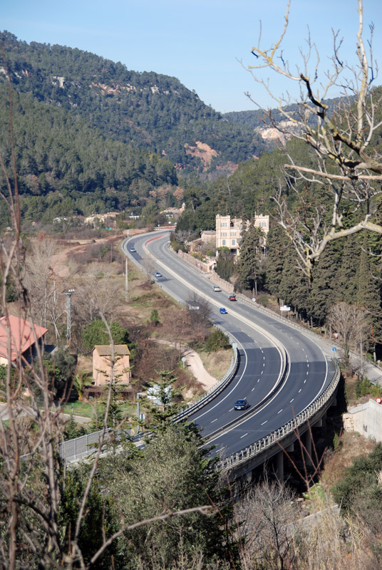 C17 a la altura de Figaró